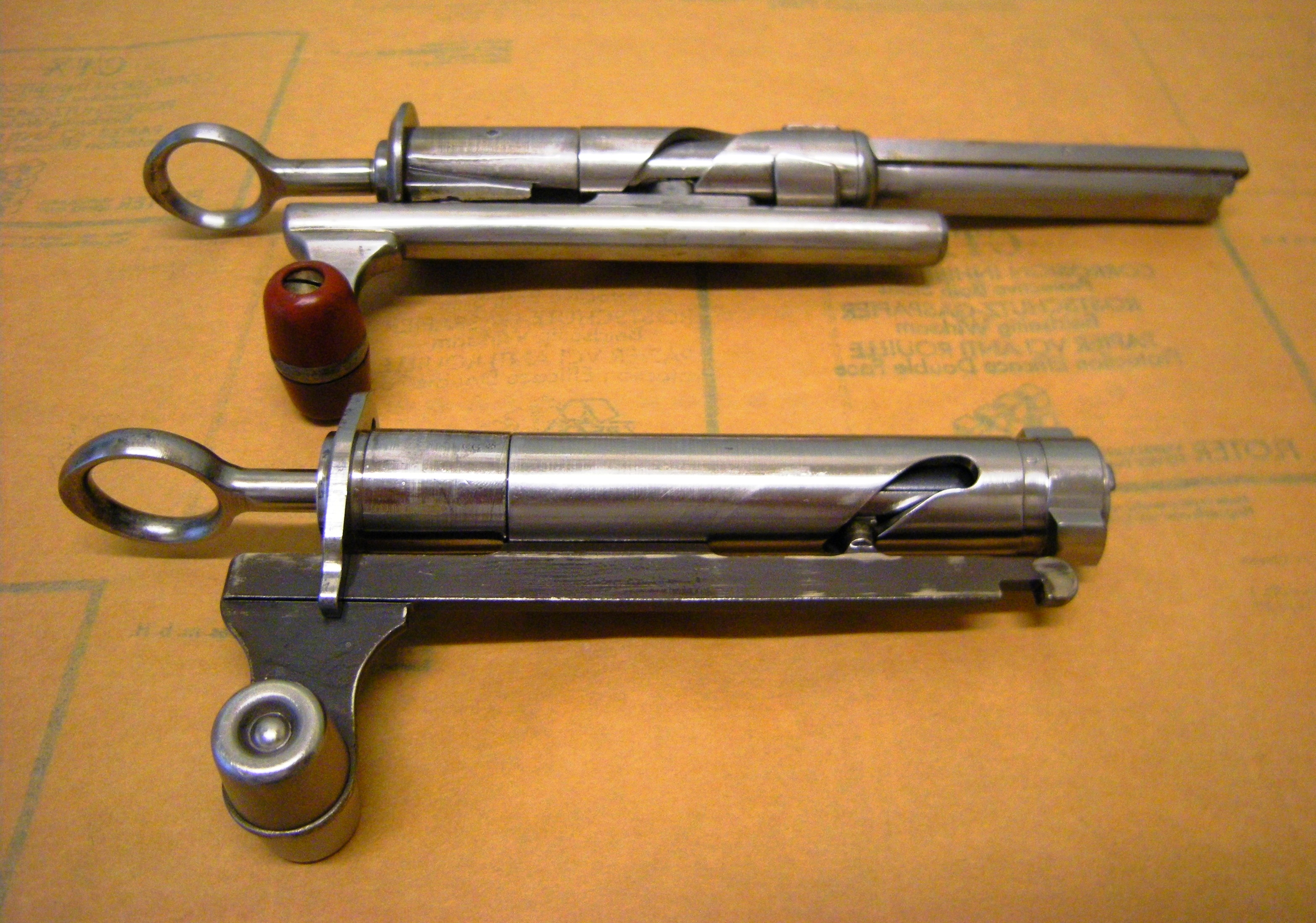 Comparaison des culasses du Mq 11 et Mq 31